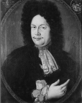 Ölgemälde in der Tübinger Professorengalerie